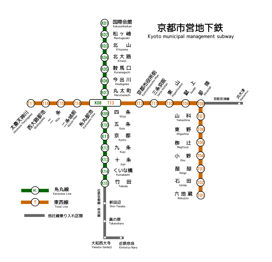 京都市营地下铁线路图